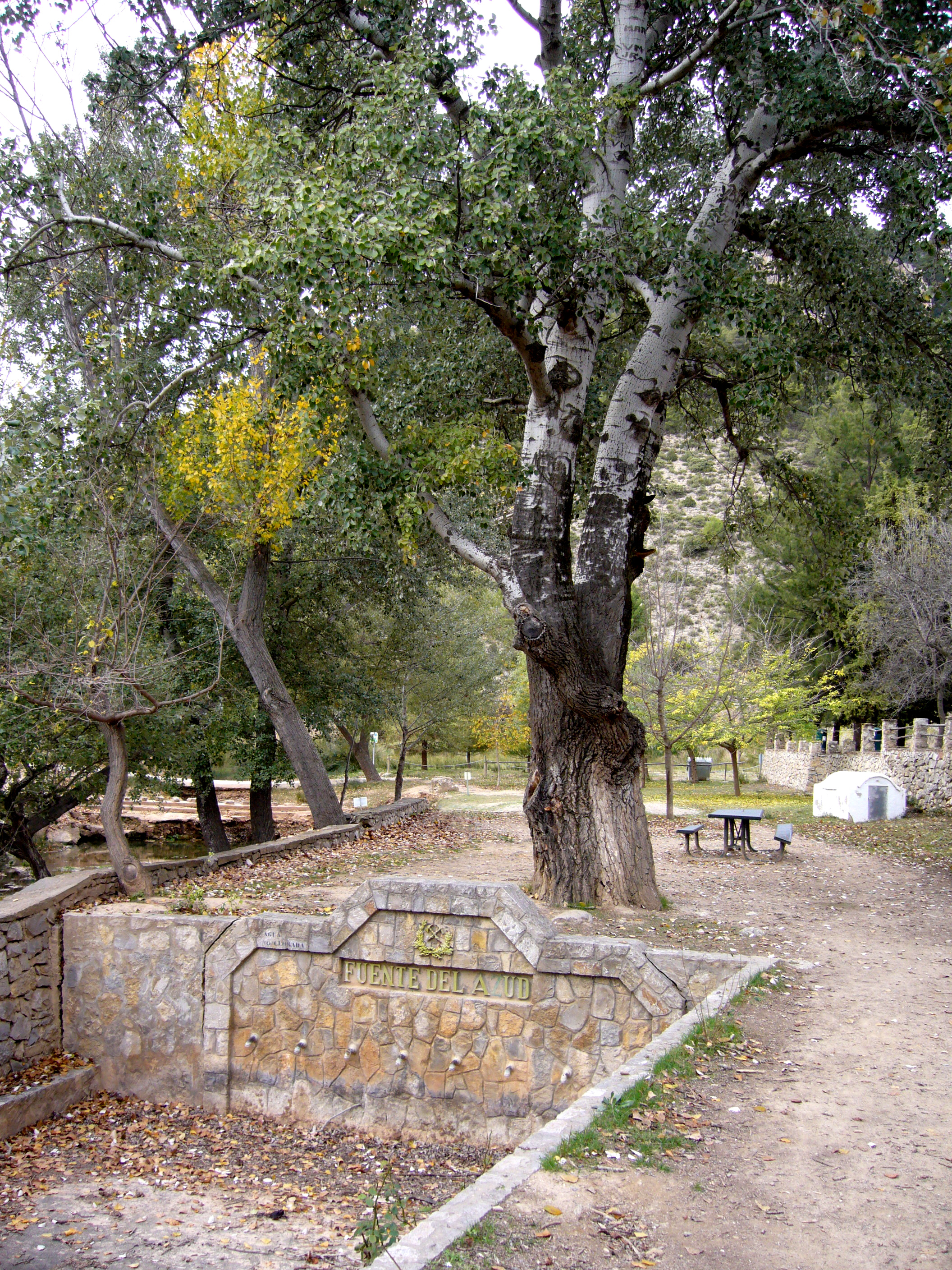 Fuente del Azud en Tuéjar (Valencia, España)